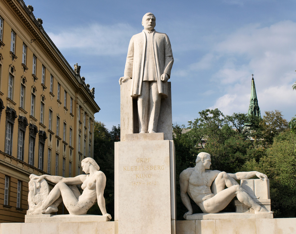 Klebelsberg Kunó szoborcsoport. Budapest, XI.ker. Villányi út 25. (templom és gimnázium között)